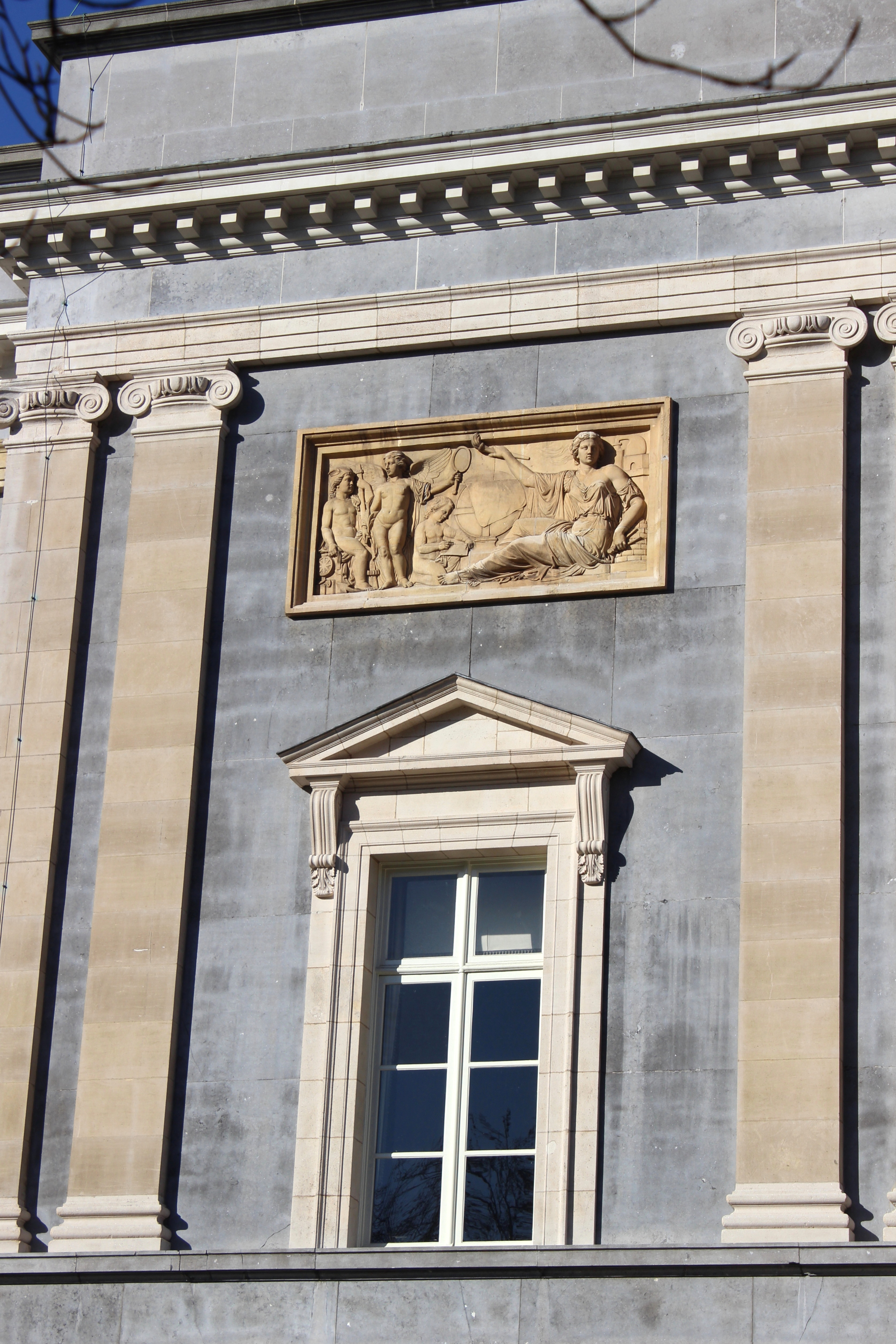 Palais des Académies, Bruxelles, Belgique. Côté N.-E. : fenêtre à fronton encadrée de pilastres ioniques et surmontée d'un bas-relief représentant les Sciences